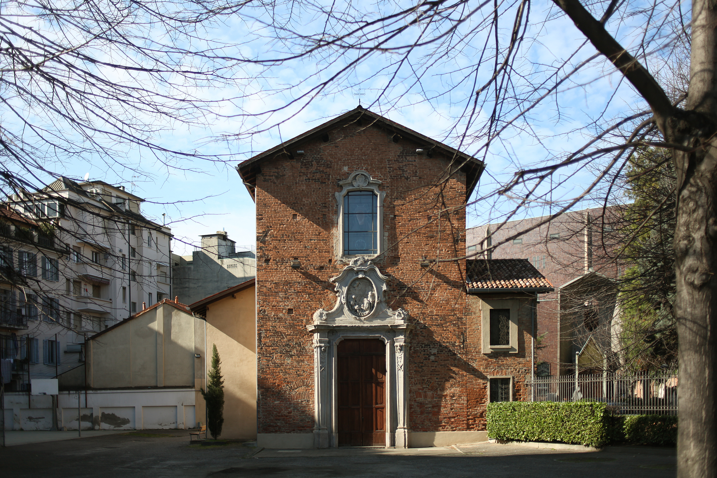 La chiesetta di San Giovannino alla Paglia, presso il fopponino di Milano; veduta orizzontale